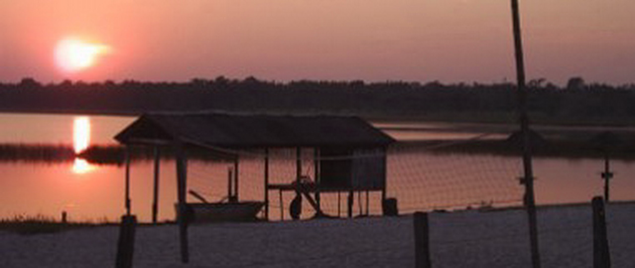 Fotos de los refugios y reservas de Itaipu, tomadas en los años 2007 y 2008 por mí